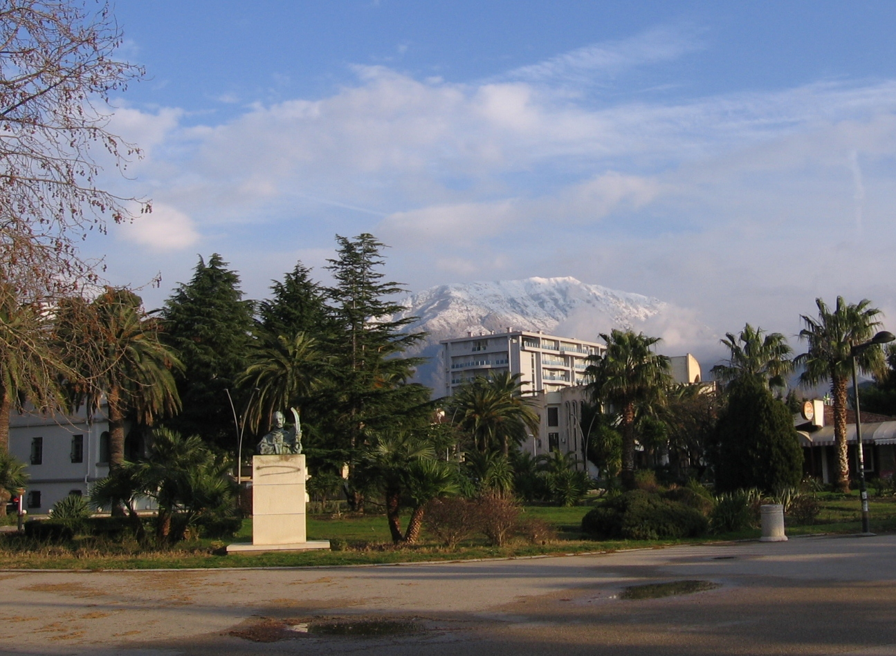 Bar, Montenegro